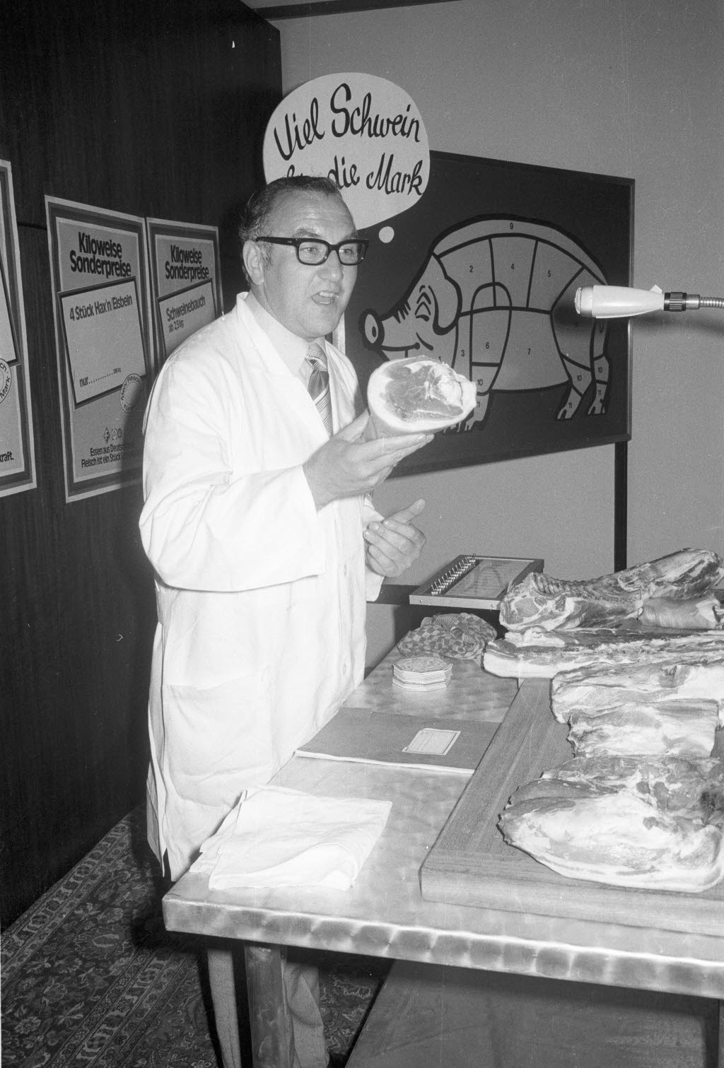 Die Centrale Marketinggesellschaft der deutschen Agrarwirtschaft (CMA) und die Kieler Fleischereifachgeschäfte starten im Hotel Conti-Hansa eine Sonderaktion zur Vermarktung von Schweinefleisch, die sich besonders an preisbewusste Hausfrauen wendet. Dabei wird auch gezeigt, wie was aus welchen Fleischstücken zubereitet werden kann.